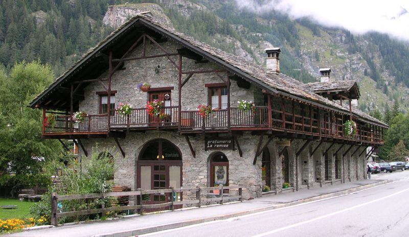 Stazione Gressoney-Saint-Jean detta La Remisa, della ferrovia elettrificata a scartamento ridotto Pont-Saint-Martin - Gressoney-Saint-Jean che non entro' mai in funzione.